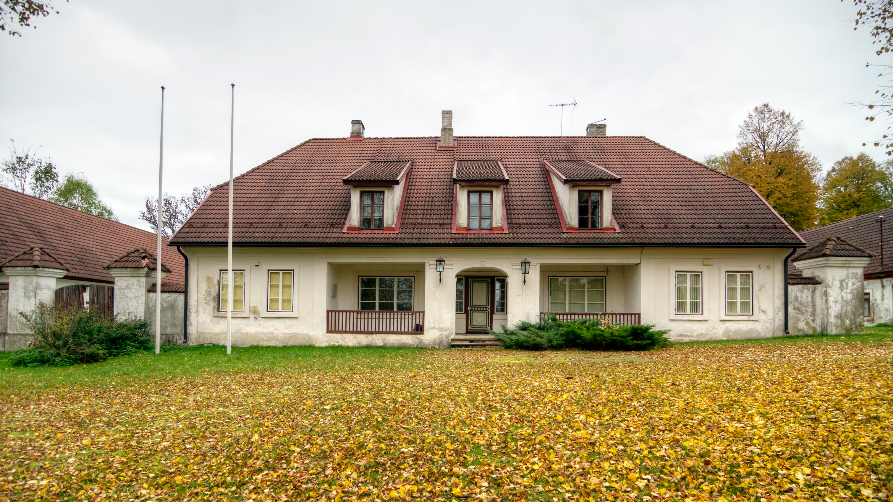 Lodja postijaama peahoone